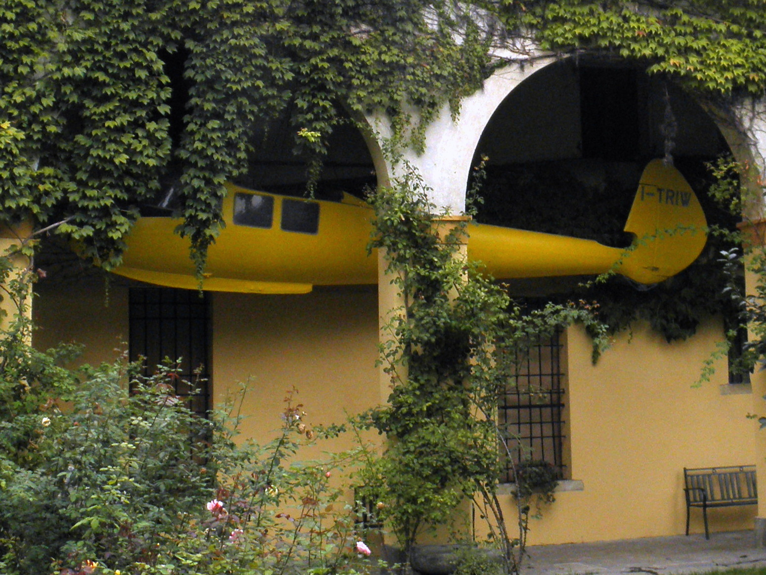 San Pelagio, frazione di Due Carrare. Museo dell'aria e dello spazio situato nella struttura di Villa Zaborra: l'aliante Ambrosini CVV 6 Canguro marche I-TRIW (ex MM 100005) sito nel porticato che circonda il giardino di rappresentanza.